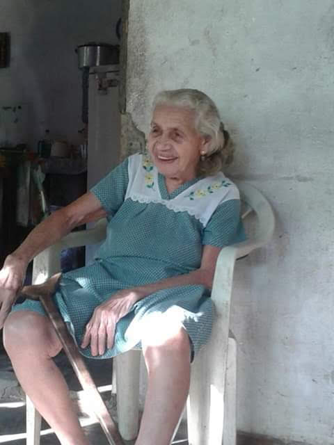 Retrato de Isabel Teresa da Silva